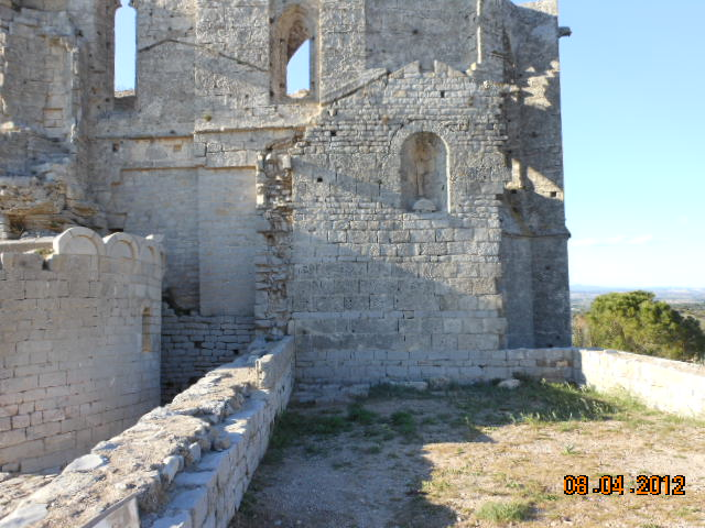 Vestiges de la salle capitulaire adossée à l'abbatiale gothique de Saint-Félix de Montceau (Gigean - Hérault)